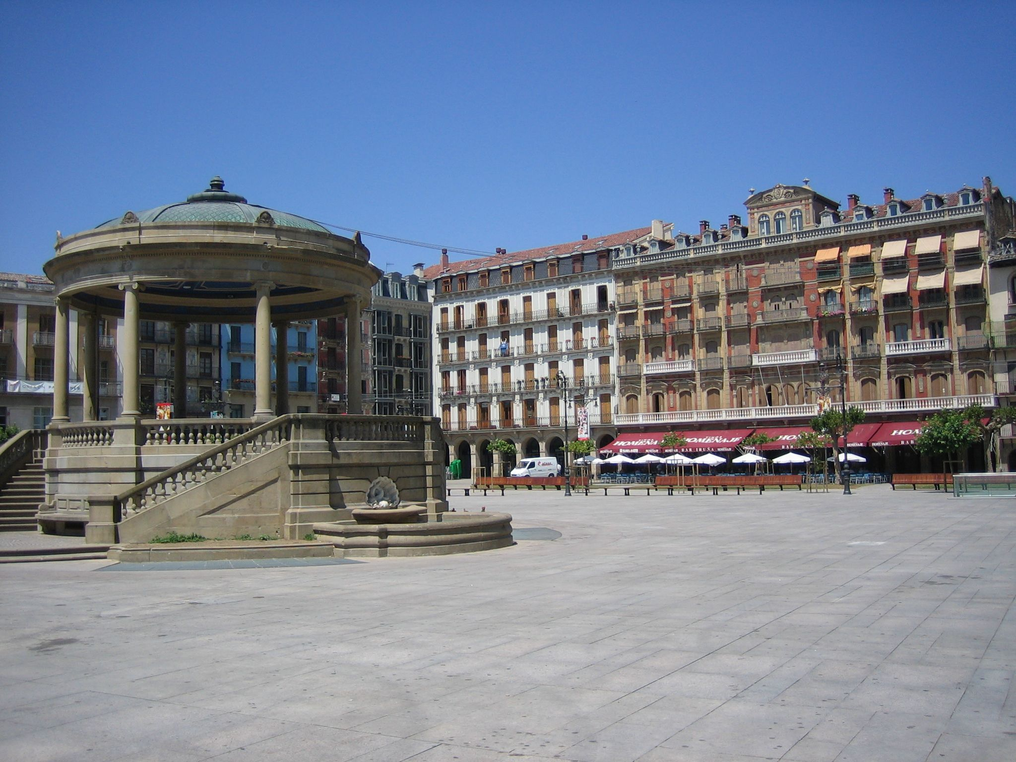 Pamplona.Platz